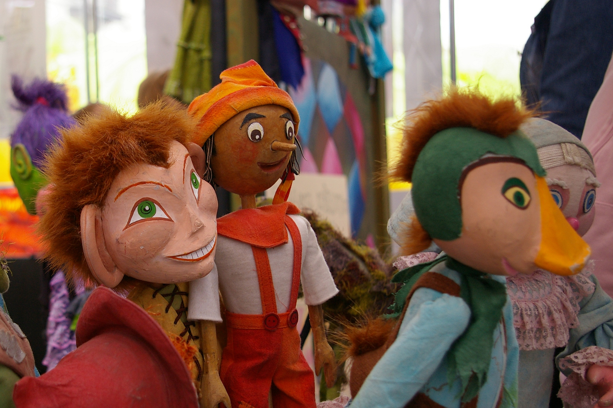 Święto Łodzi 2010 Lalki teatru Arlekin w czasie święta Łodzi na ulicy Piotrkowskiej.